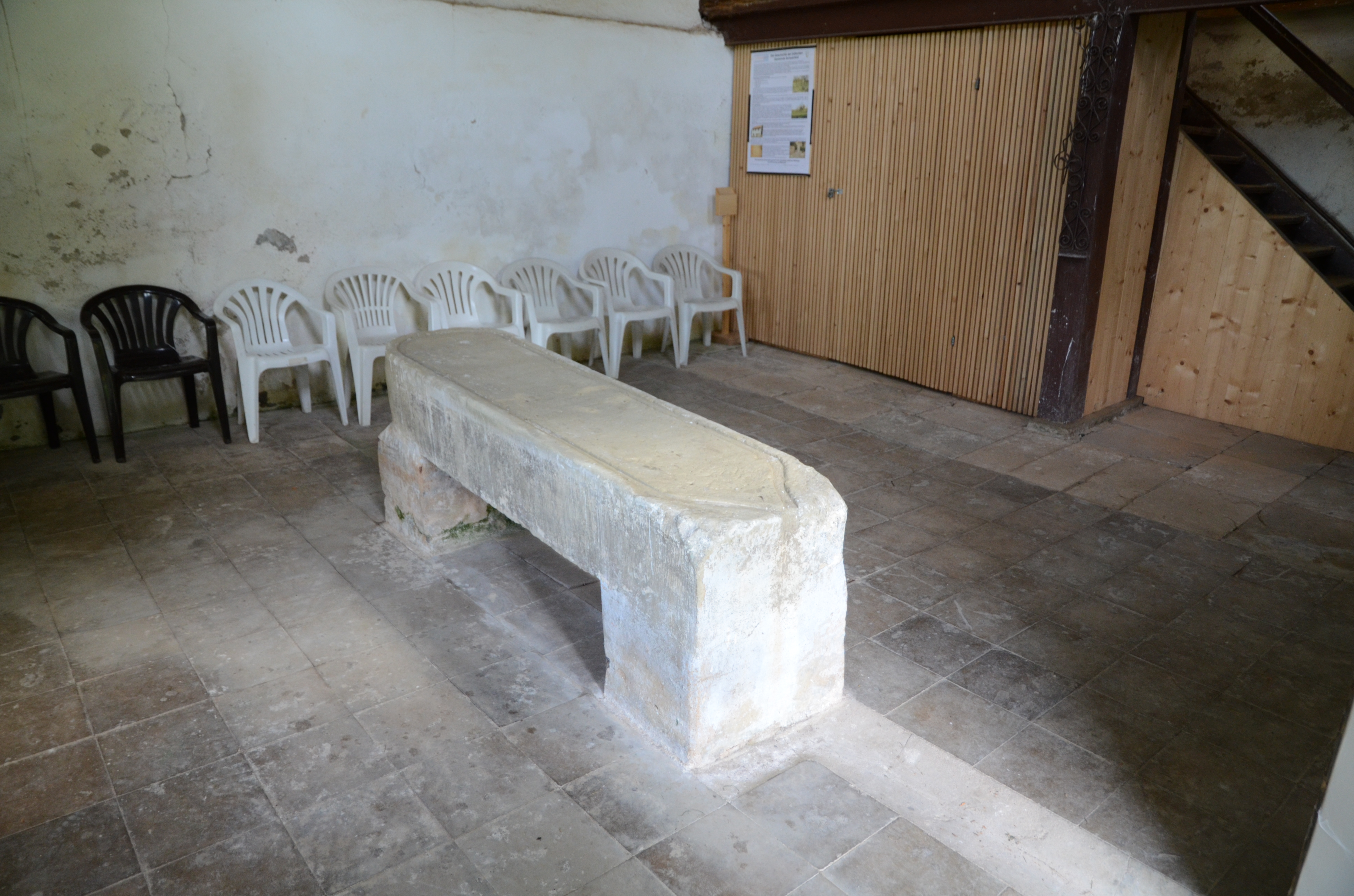 Taharahaus im Jüdischer Friedhof in Schwanfeld